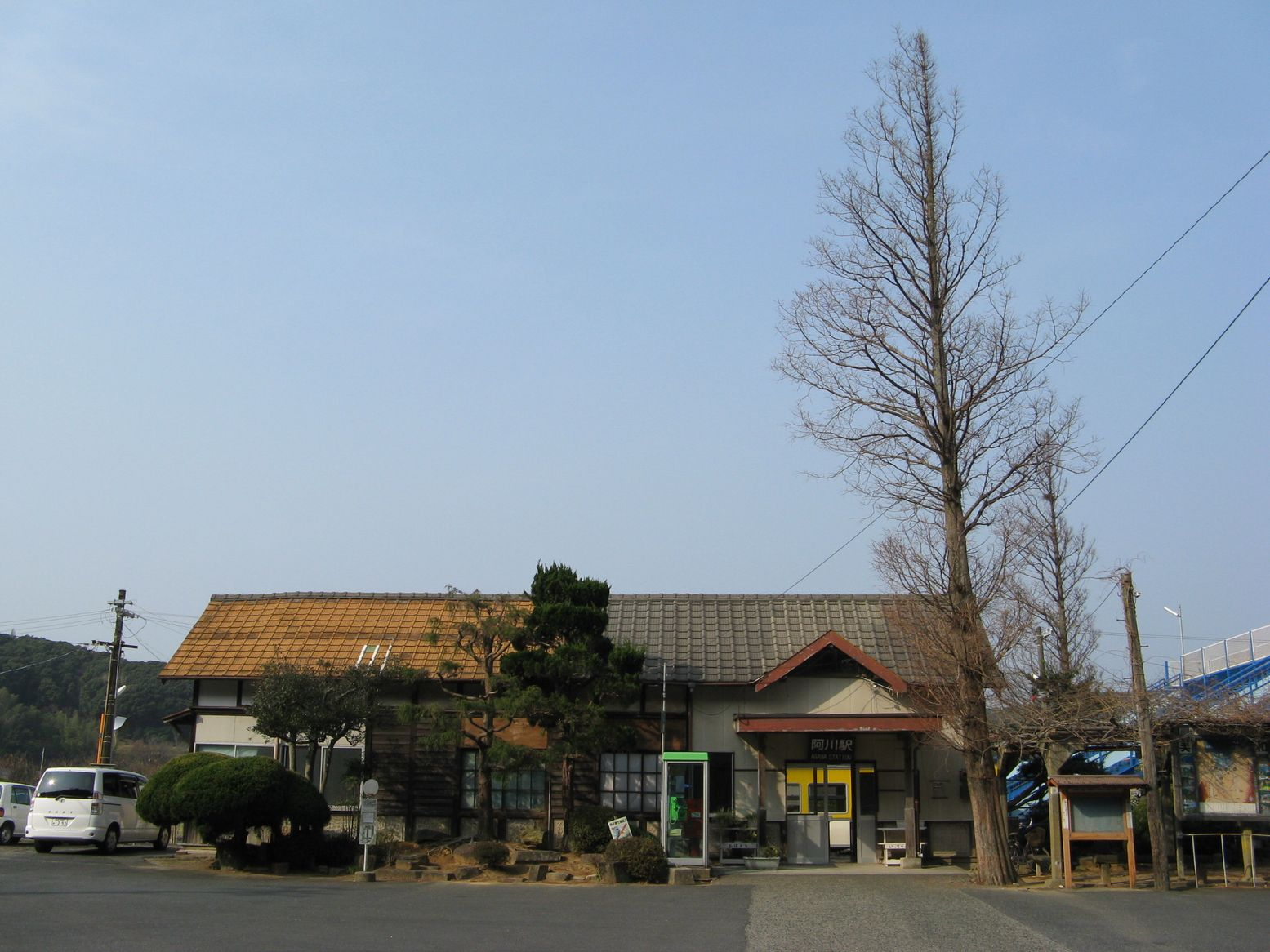 阿川駅駅舎